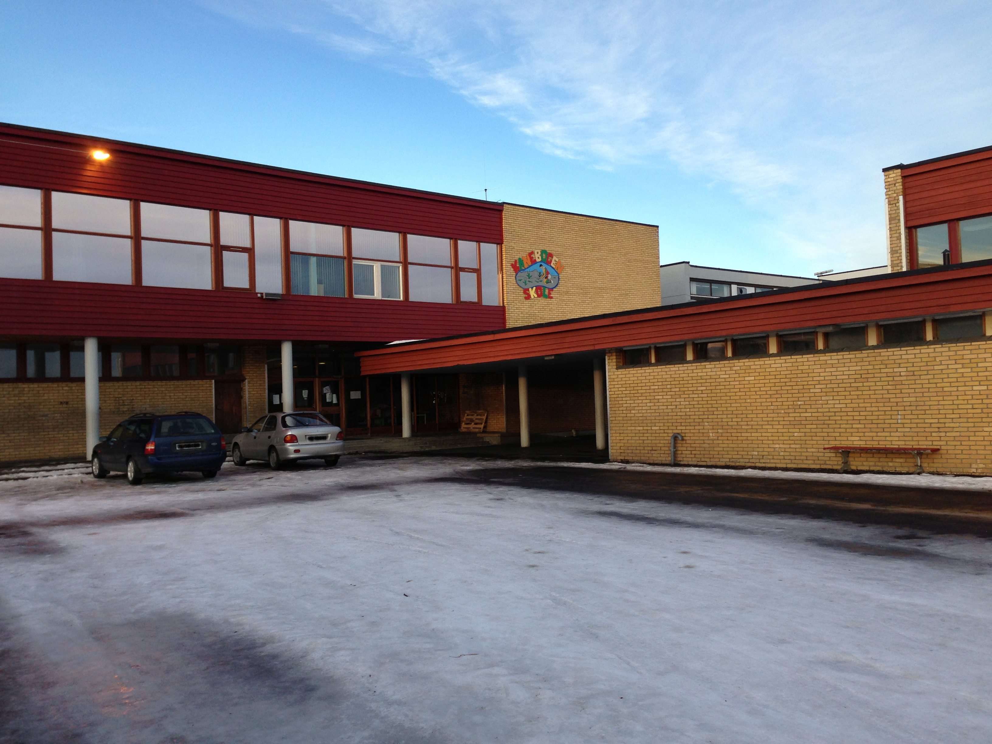 Kanebogen skole, Harstad